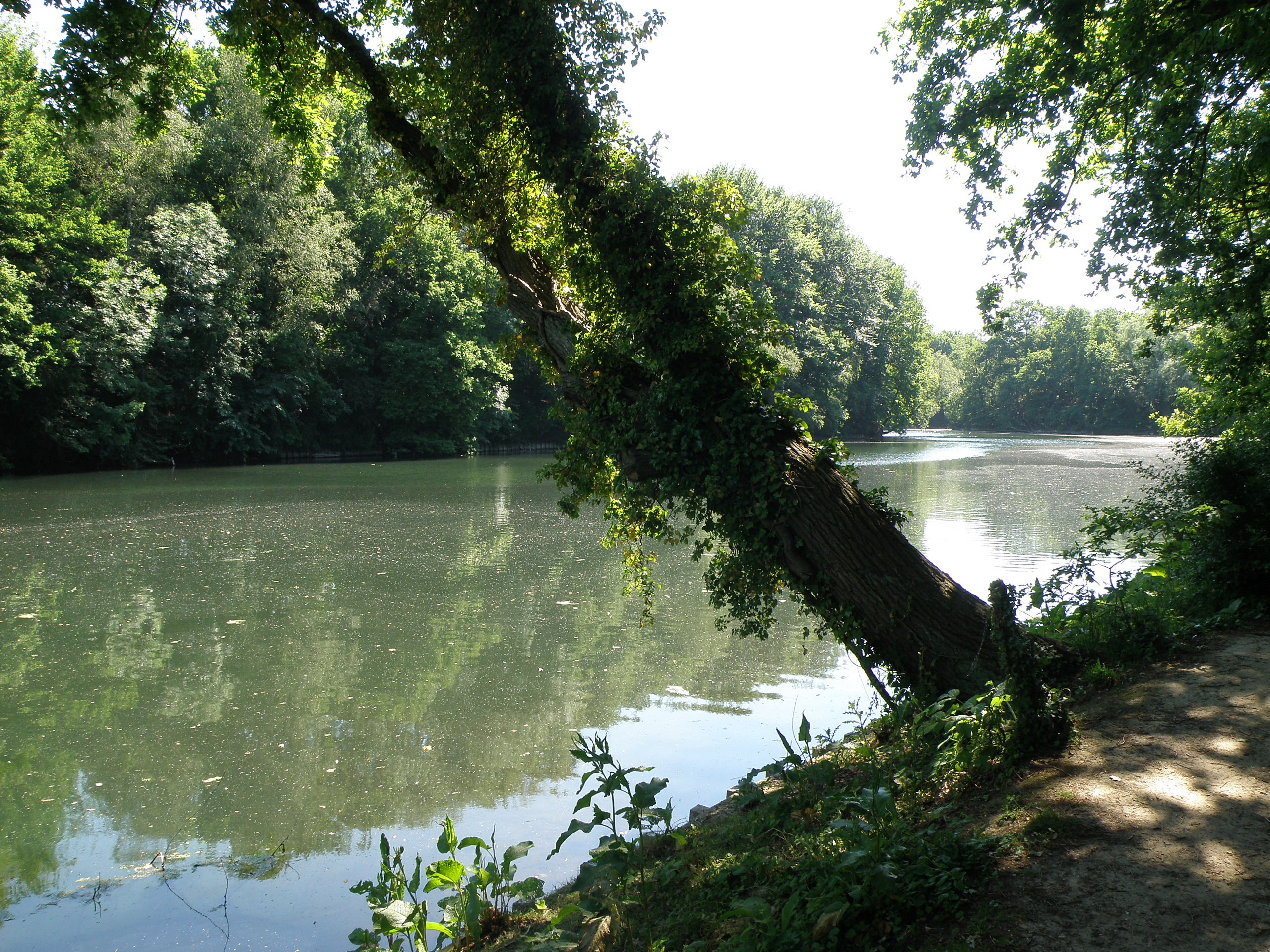 Mortsel (prov. Antwerpen, België). Fort IV, onderdeel van Brialmont-fortengordel rond Antwerpen.